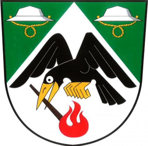 Znak obce Poběžovice u Přelouče